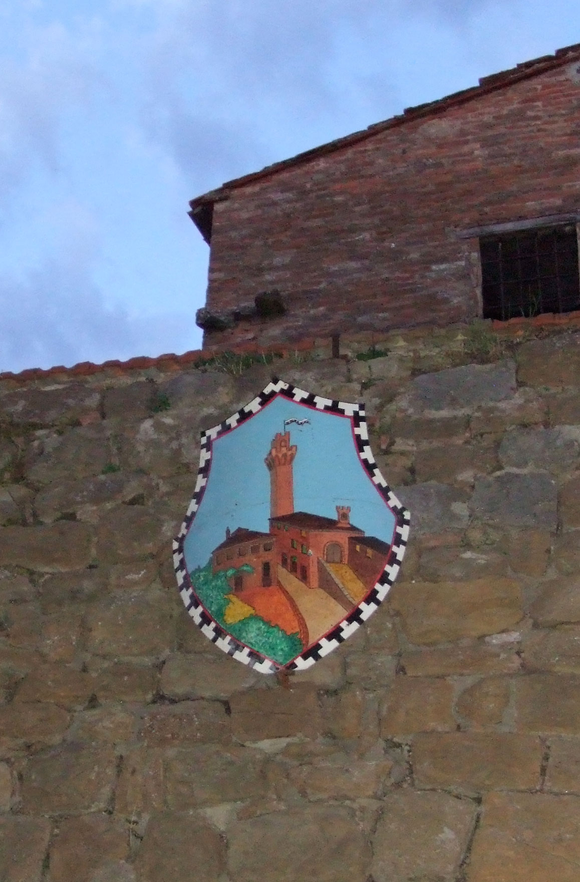 Plaque de la Grancia restituant le centre fortifié de Montisi avec sa tour abattue